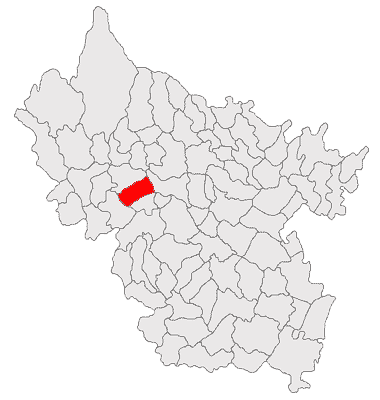 Categorie:Hărţi ale judeţului Buzău